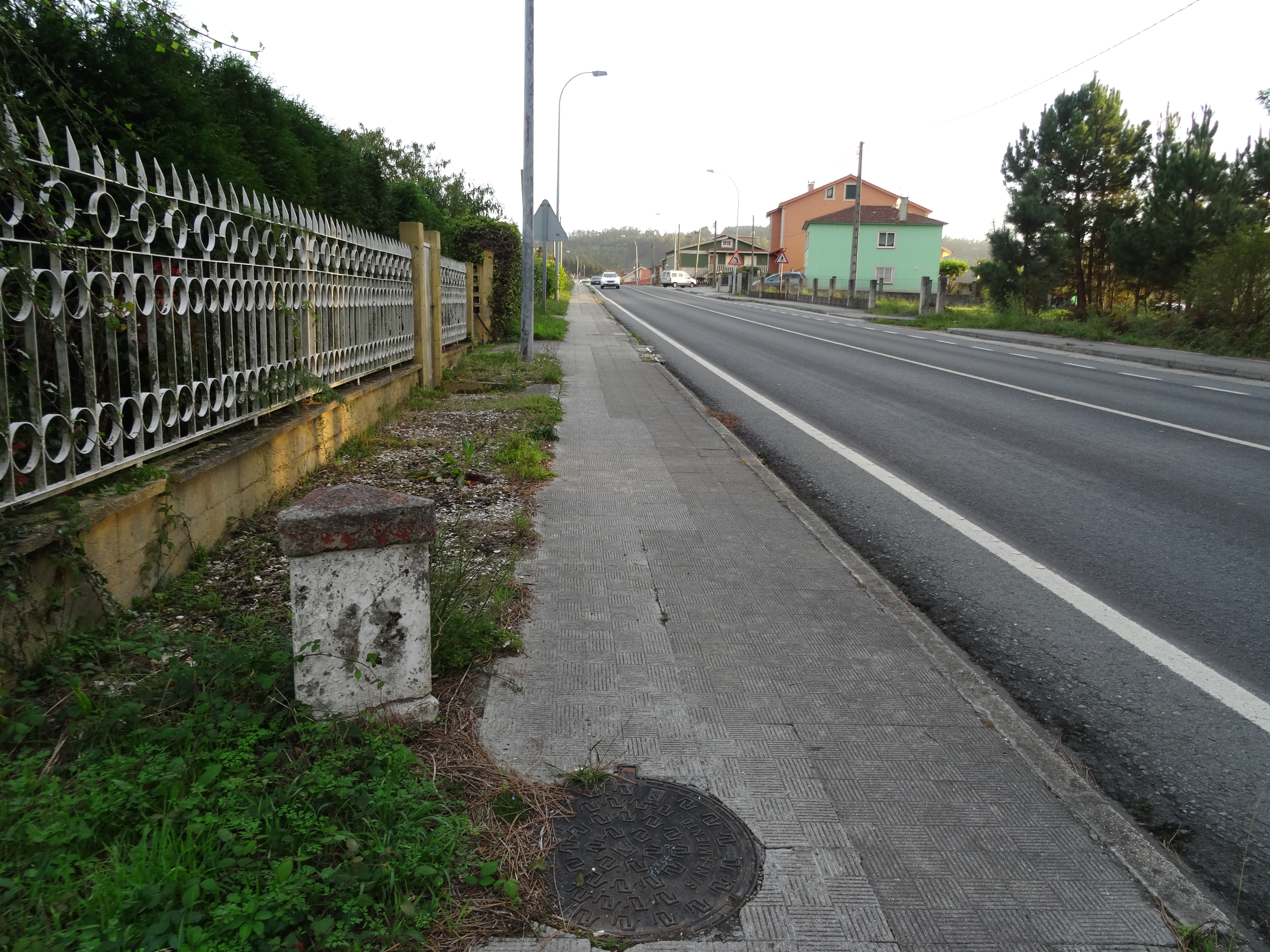 Ver título.